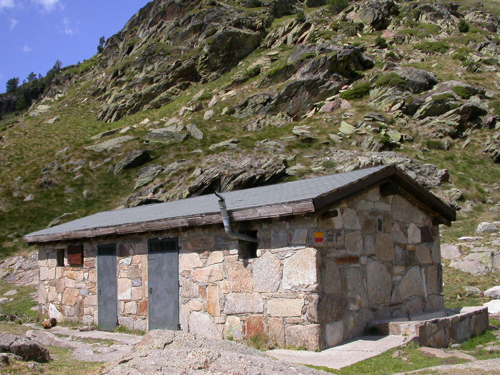 Refugi de Coms de Jan